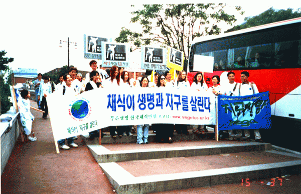 2000년.명동성당에서 채식캠페인